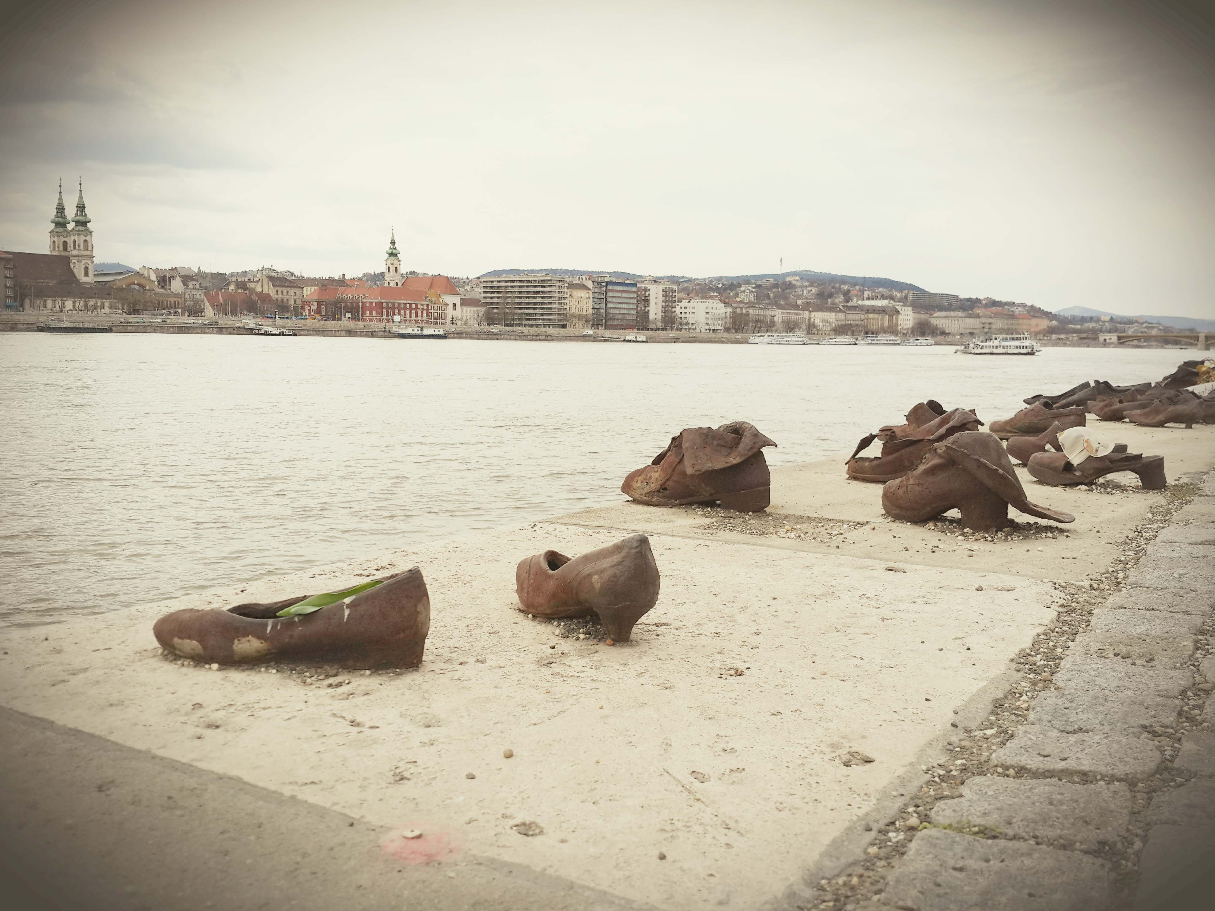 נעליים על הדנובה